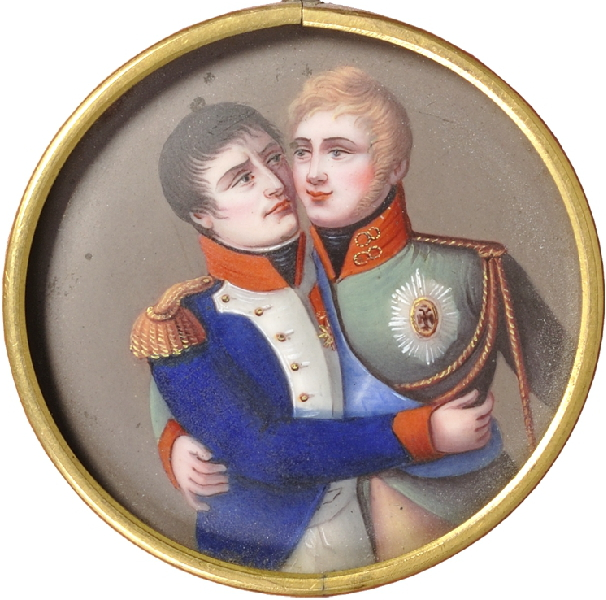 Медальон «Миниатюра на тему Тильзитского мира» Франция. 1810-е Бронза, эмаль, роспись На одной стороне изображение объятий Наполеона и Александра I, на другой - шатер посредине реки Неман, где происходили переговоры.